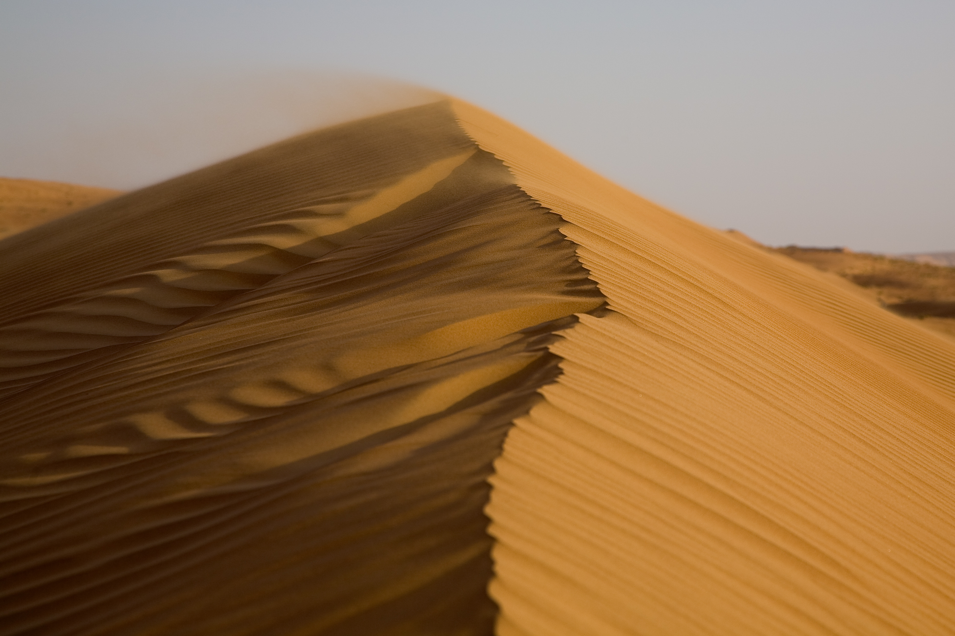 Wahiba Sands, Oman